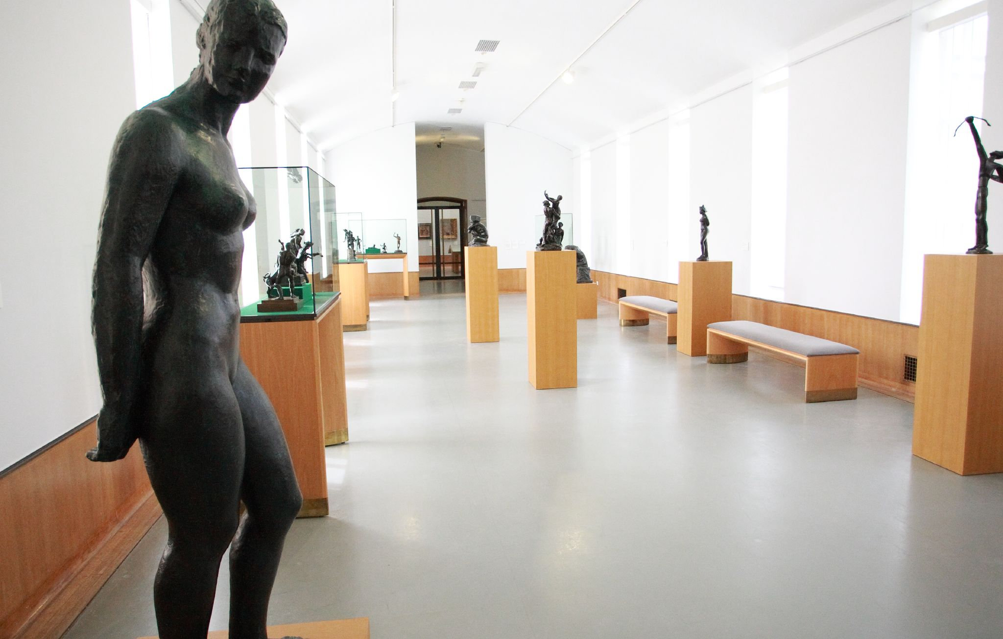 Venster 2 (De wapens van Jan van Valkenburg en zijn echtgenoot Johanna van Voorne, vrouwe van Bergen op Zoom.)De bronzen (Collectie 15de-17de eeuw, zaal 15) In het kader van Wiki Loves Art NL.